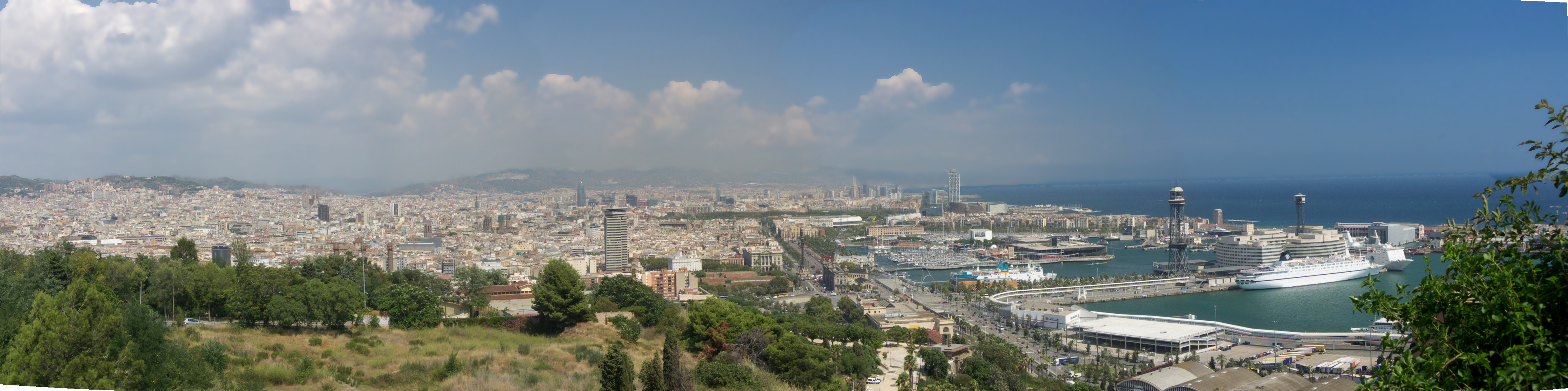 Barcelona - panorama